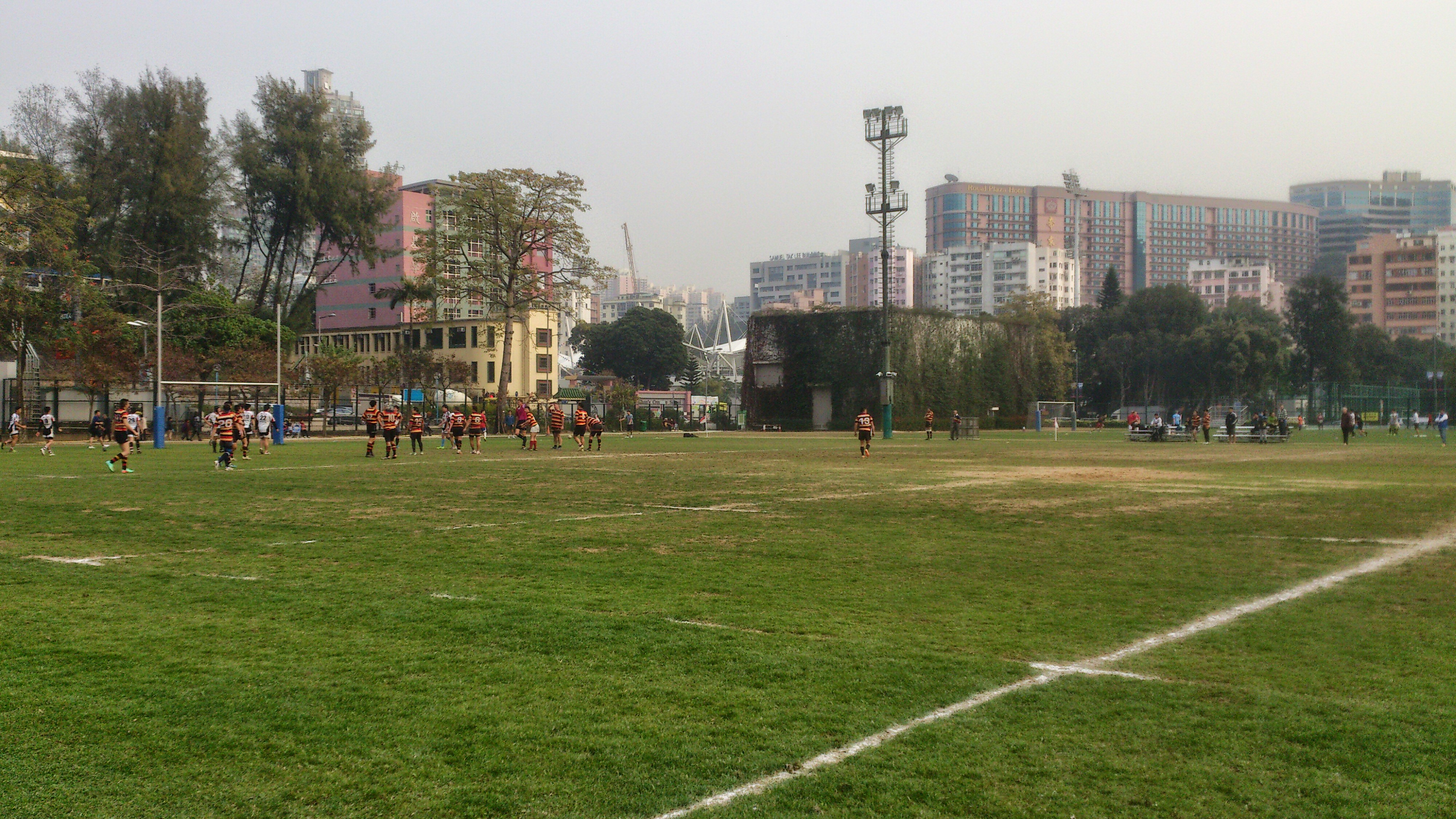 Hong Kong